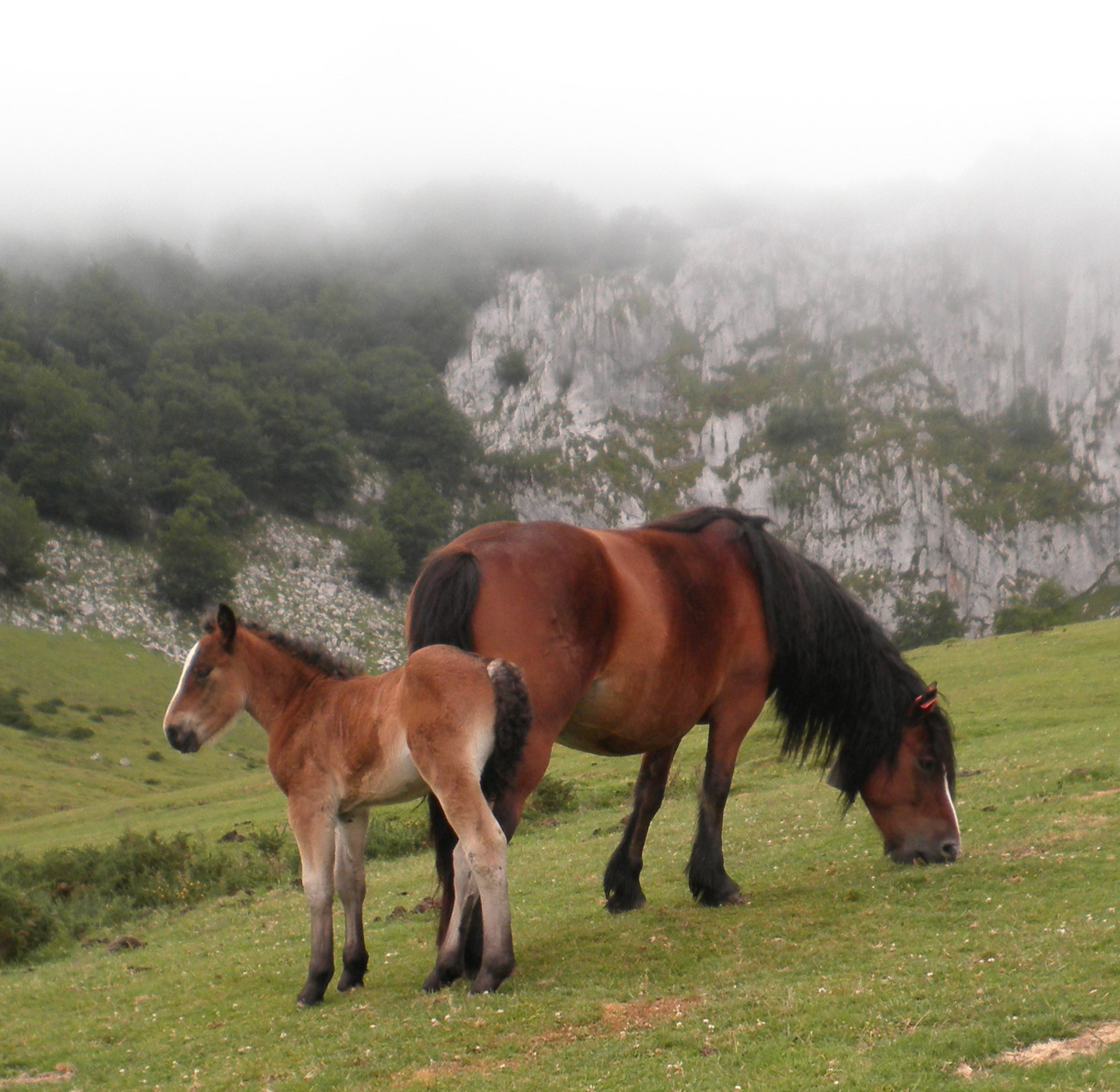 Behorra bere umearekin Arrabako zelaietan. Gorbeia.